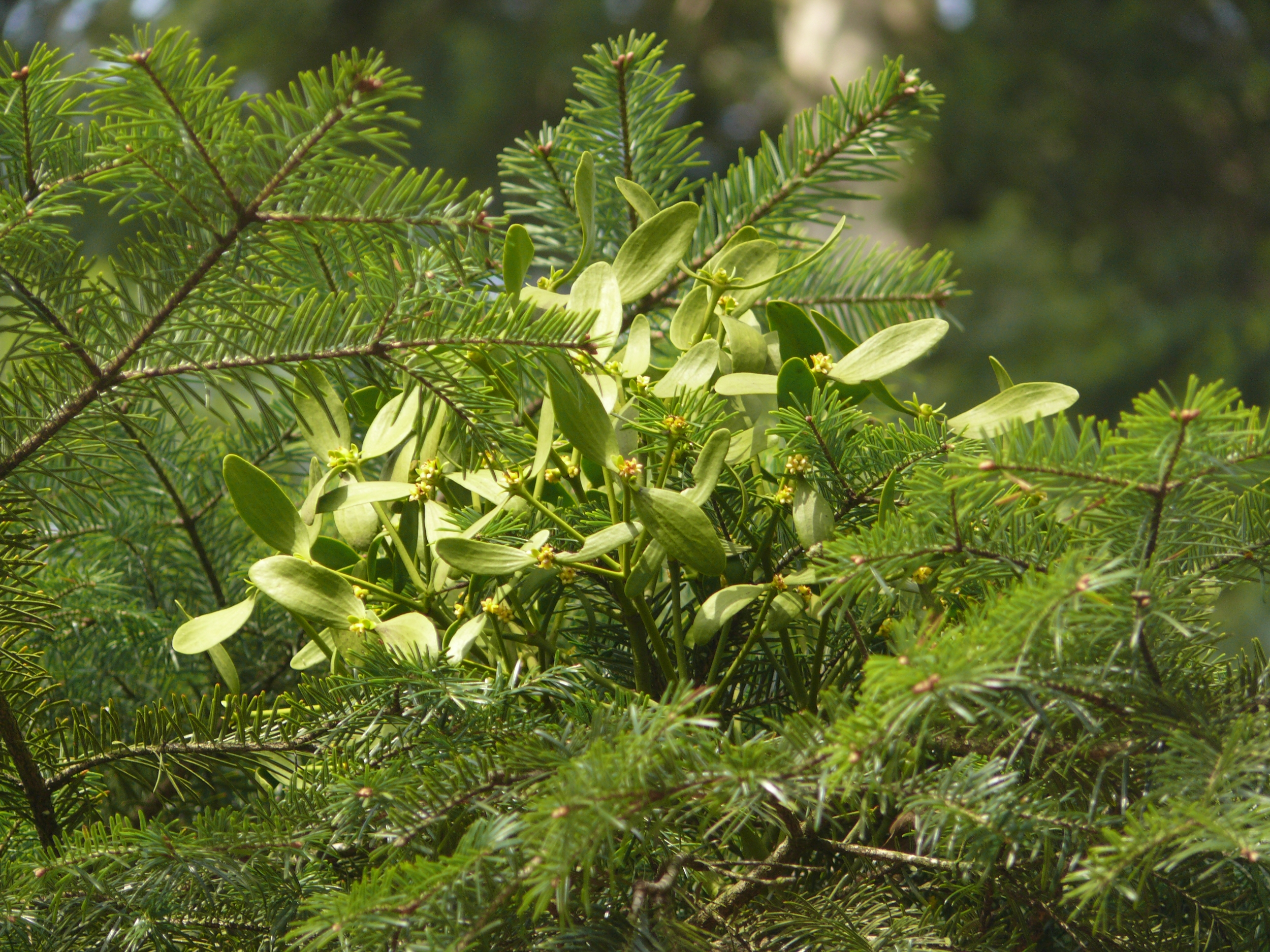 Viscum album subsp. abietis, Schwäbisch-Fränkischer Wald